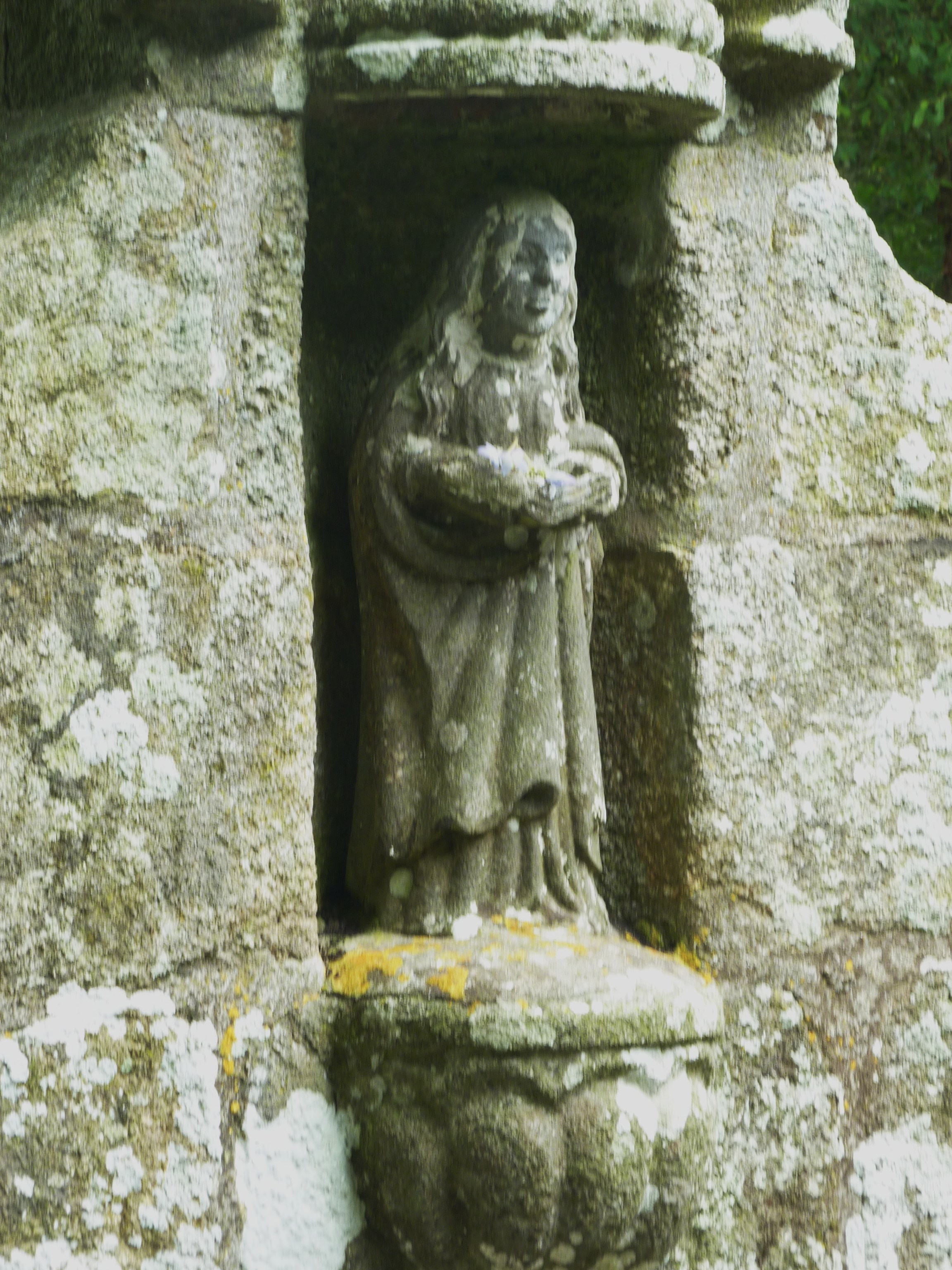 Ploudaniel : statue de la fontaine près de la chapelle Sainte-Pétronille